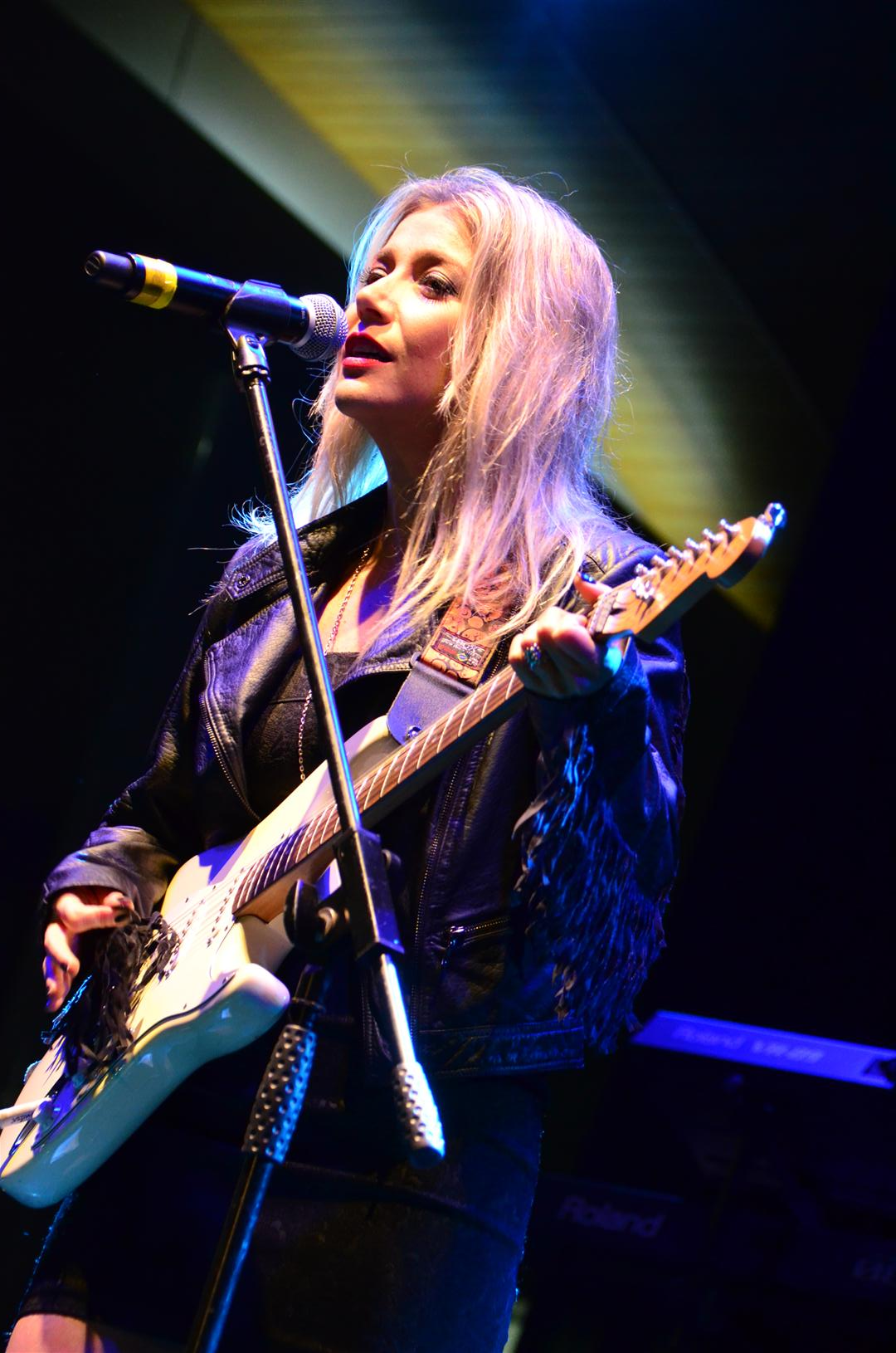 Foto: André Luiz D. Takahashi